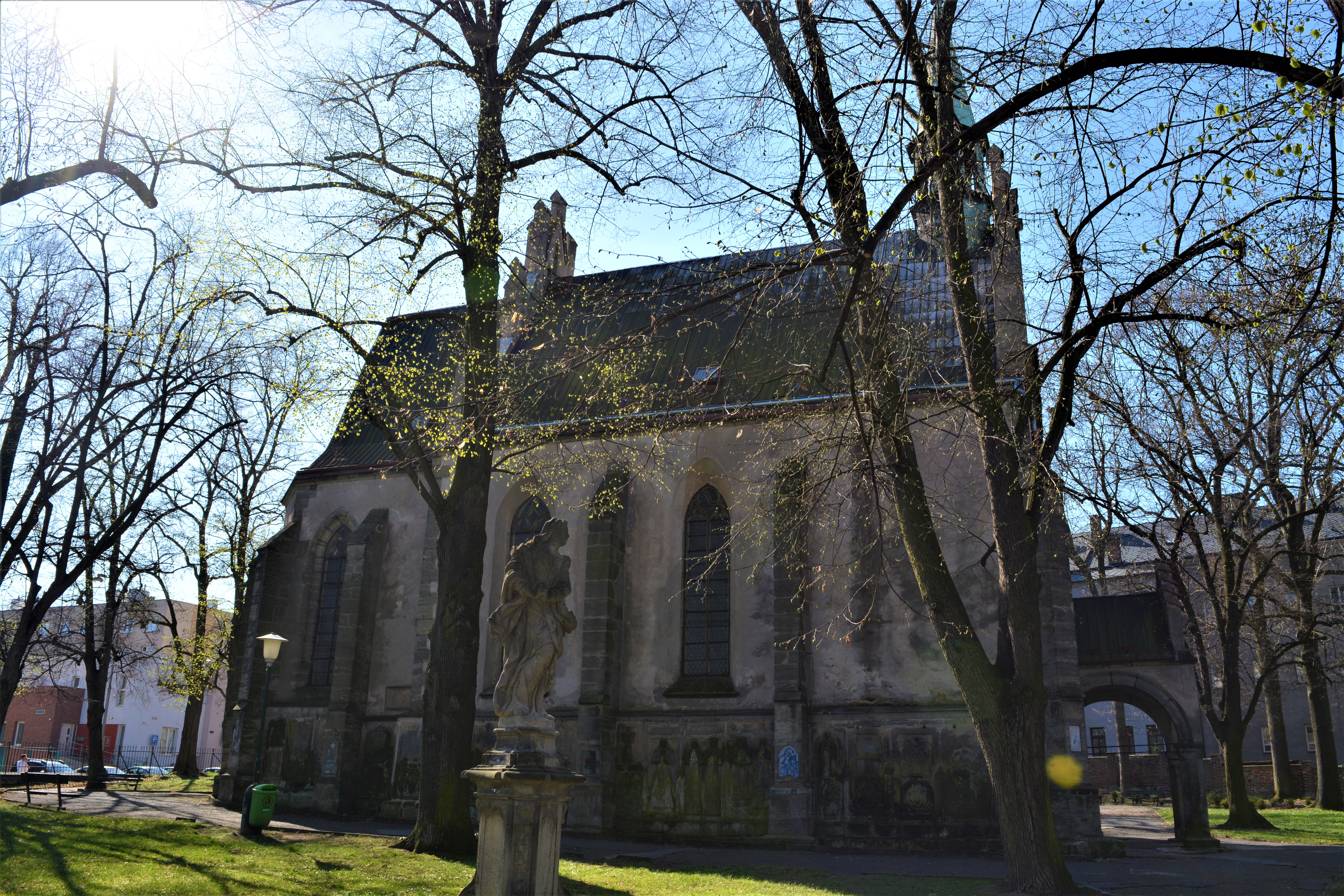 Severní strana kostela svatého Michala v Chrudimi